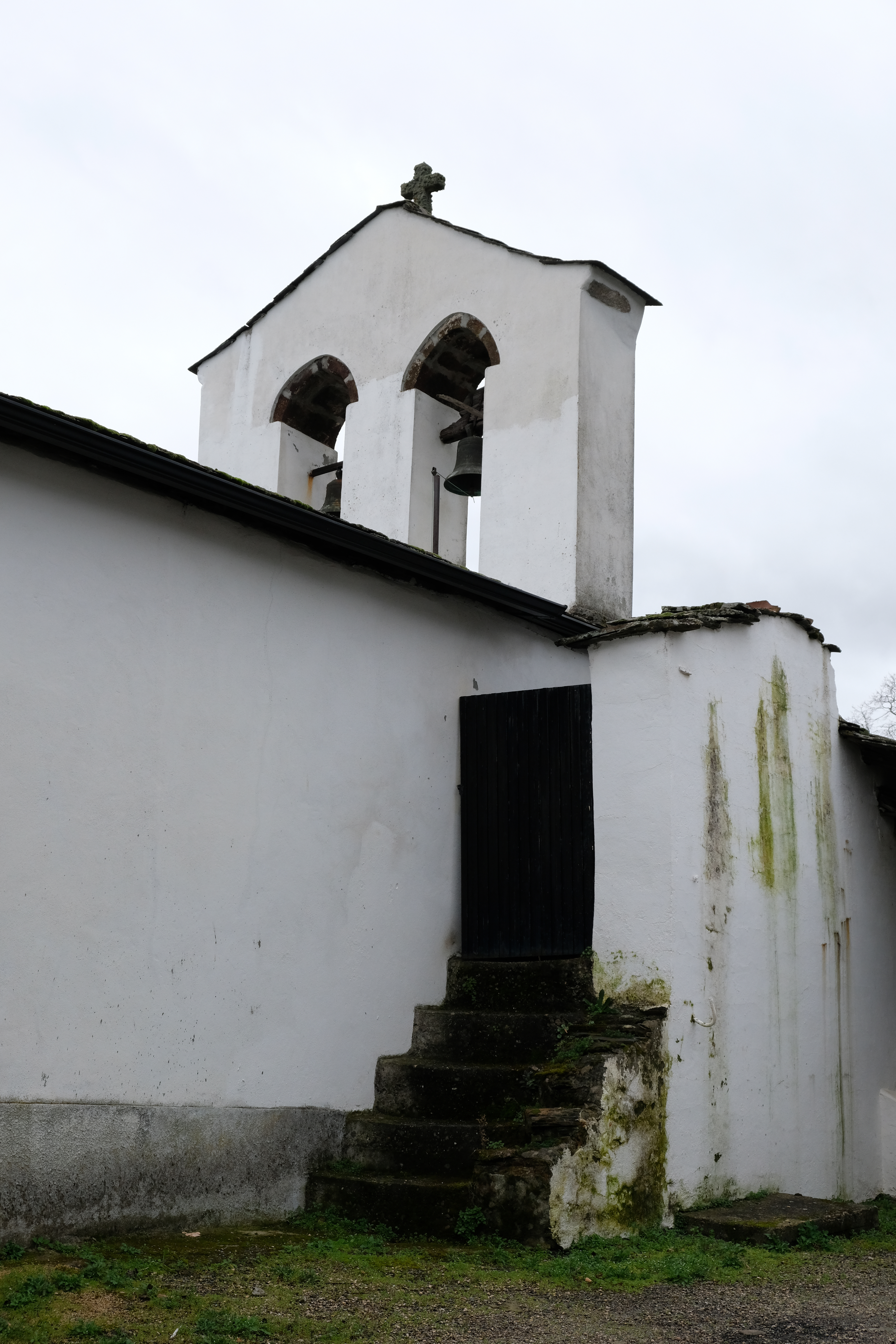 Igrexa parroquial de San Miguel do Outeiro, Vilamartín de Valdeorras